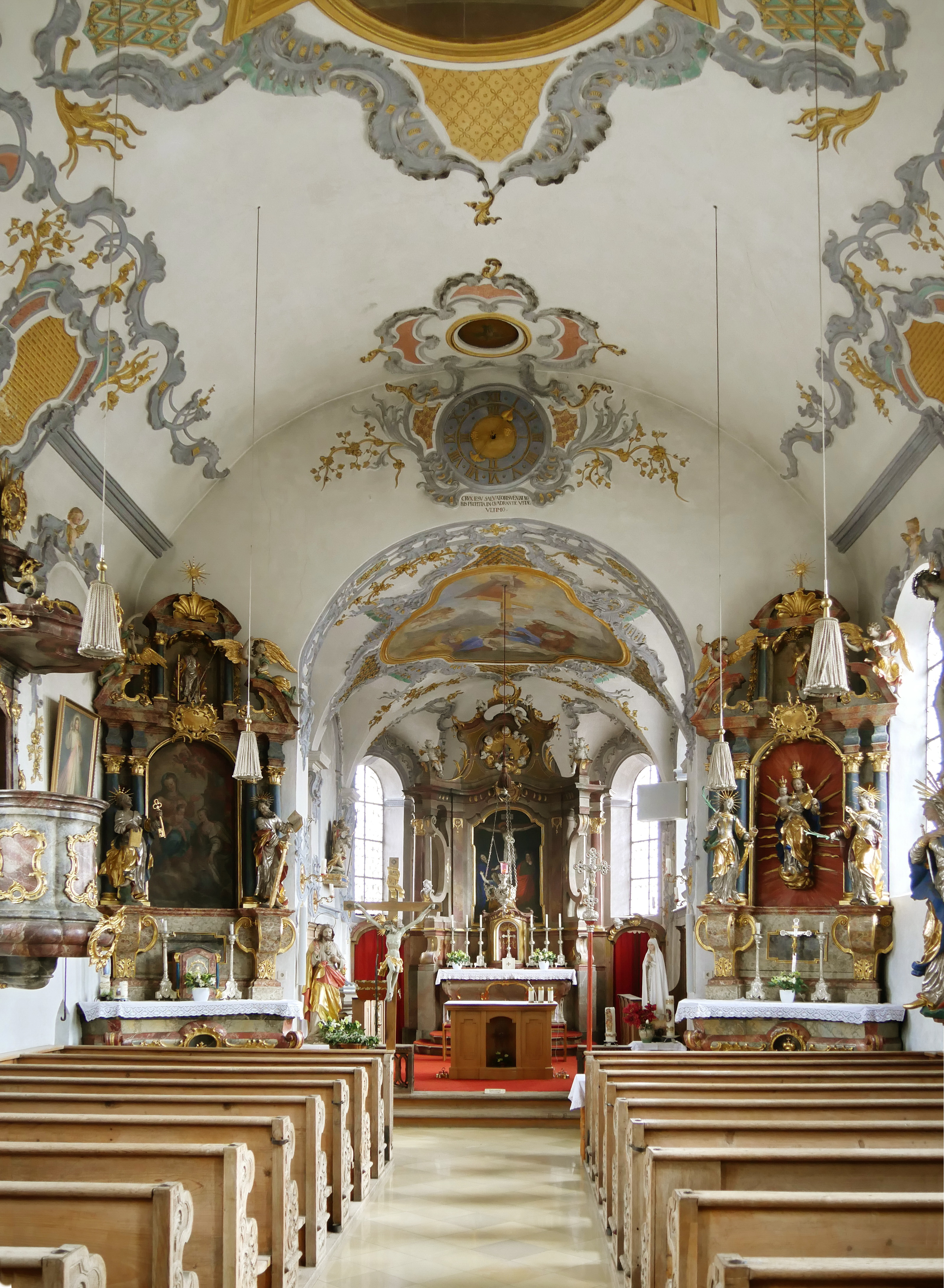 Finning, Ortsteil Oberfinning, Katholische Pfarrkirche Heilig Kreuz: Blick zum Altar, im Langhaus Tonnengewölbe, im Chorraum Stichkappen